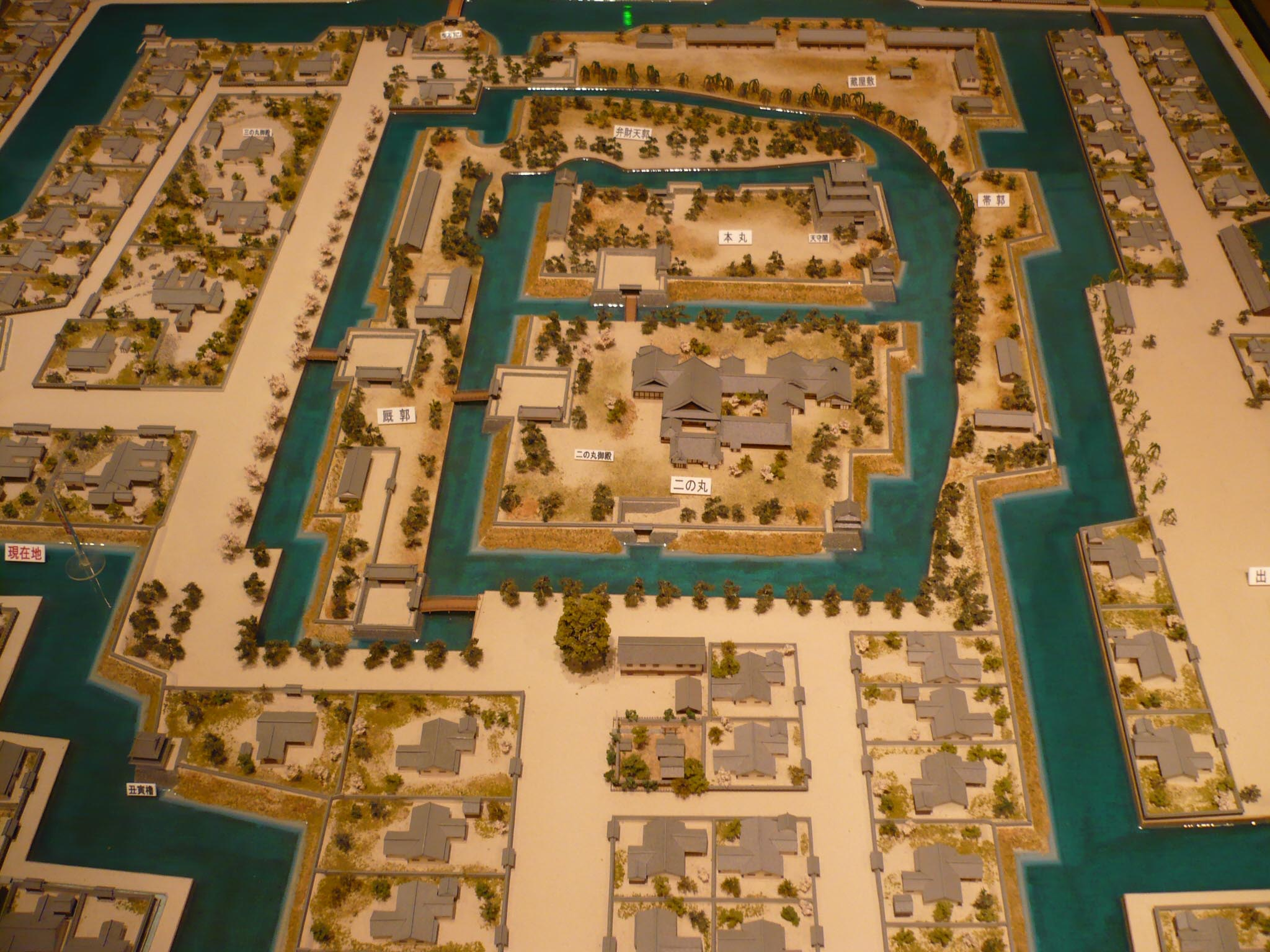 高槻城復元模型